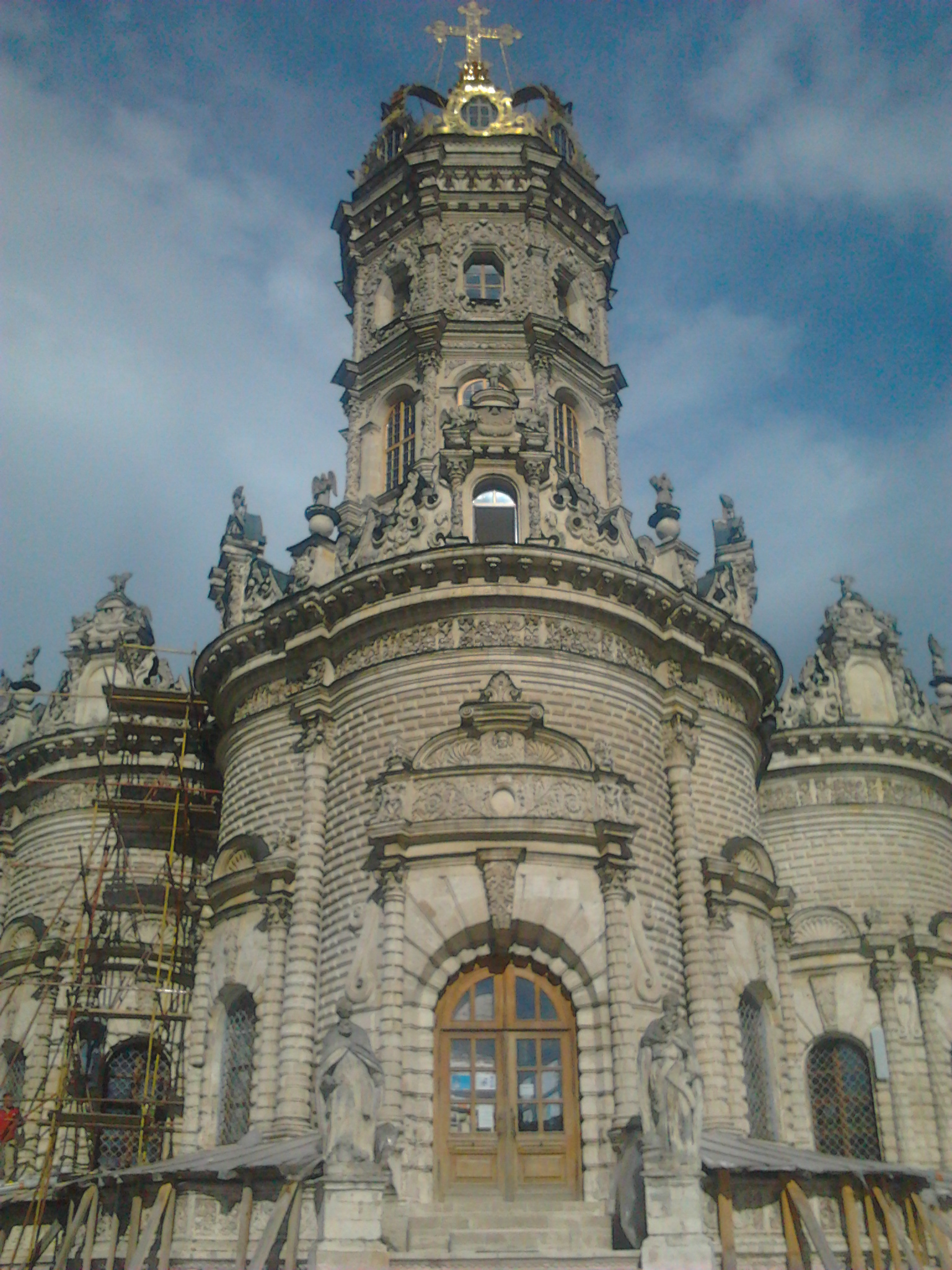 Фотографии